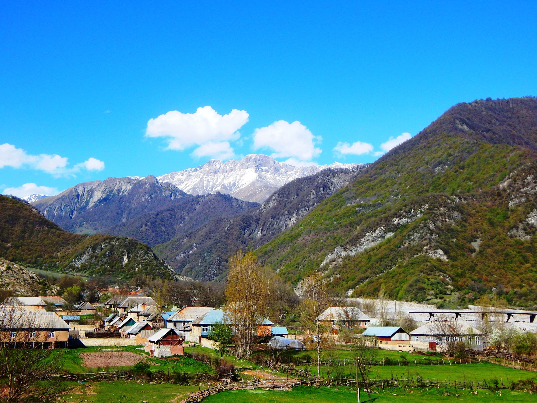 Баш Дашагил 2018